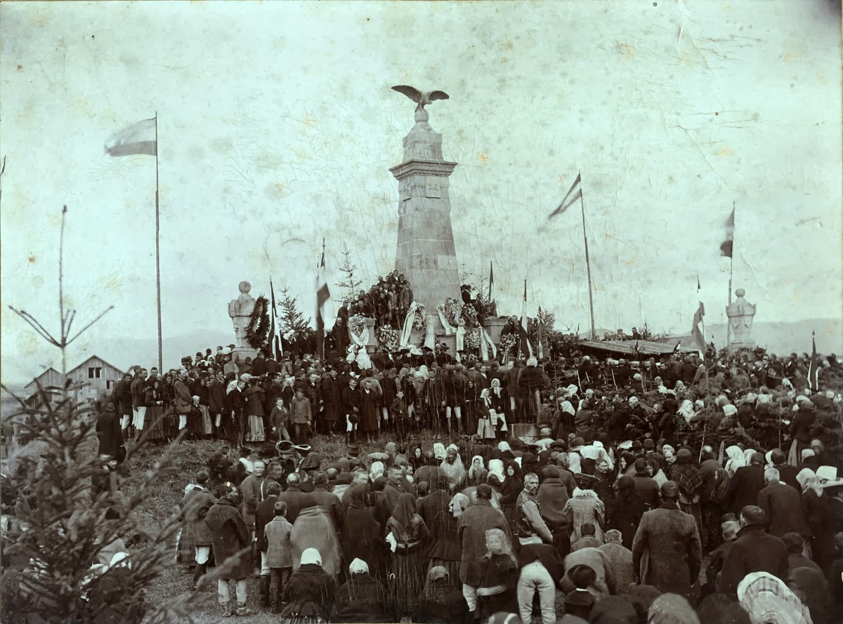 Inaugurarea monumentului de la Madefalău (actual Siculeni, Harghita), la 8 octombrie 1905.